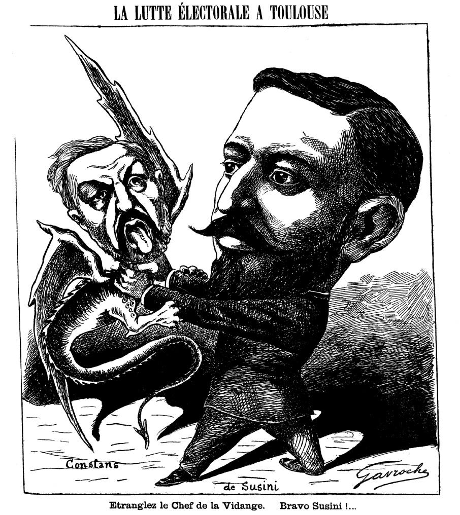 Paul de Susini contre Ernest Constans.